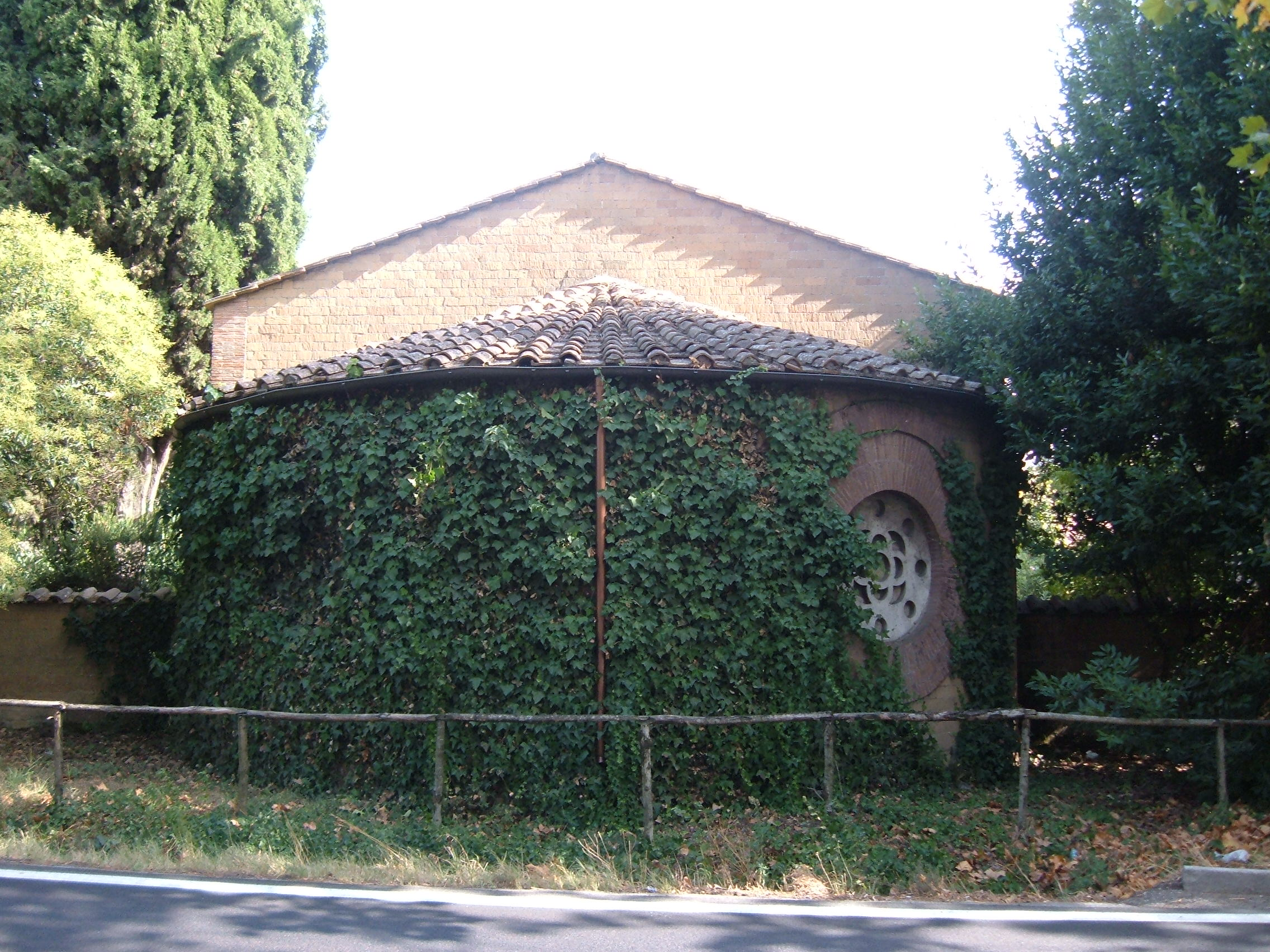 Abside esterna della basilica paleocristiana di Sant'Alessandro, sopra le catacombe omonime.